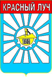 Герб города Красный луч (Луганская область)